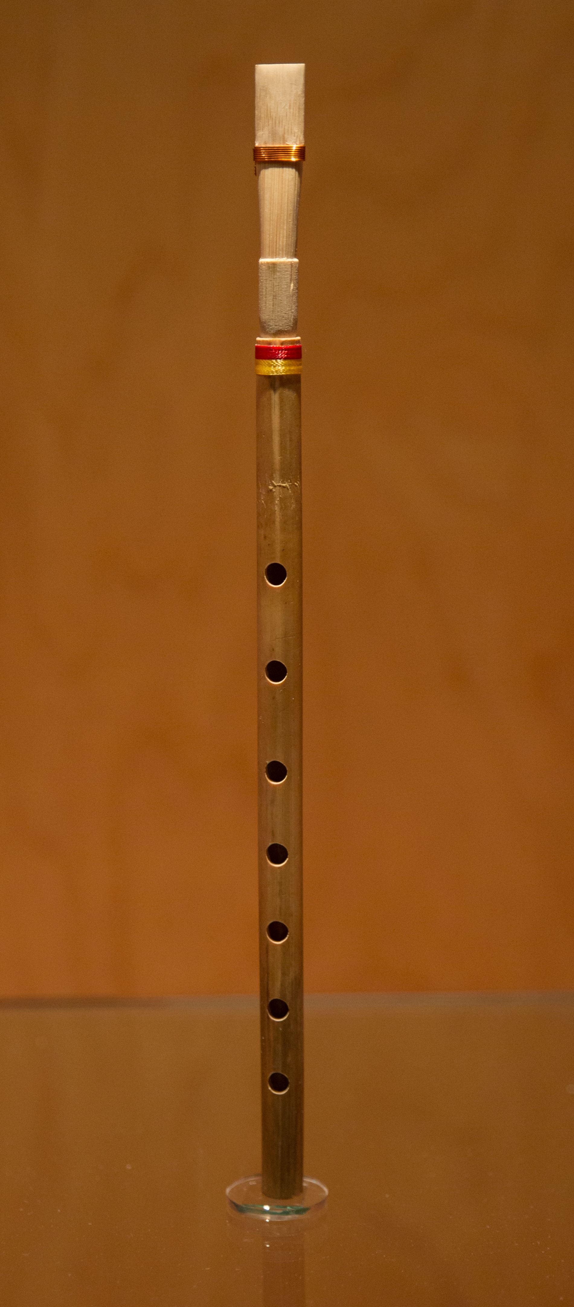 Hyangpiri, exposat a Eolssigu! Els sons de Corea